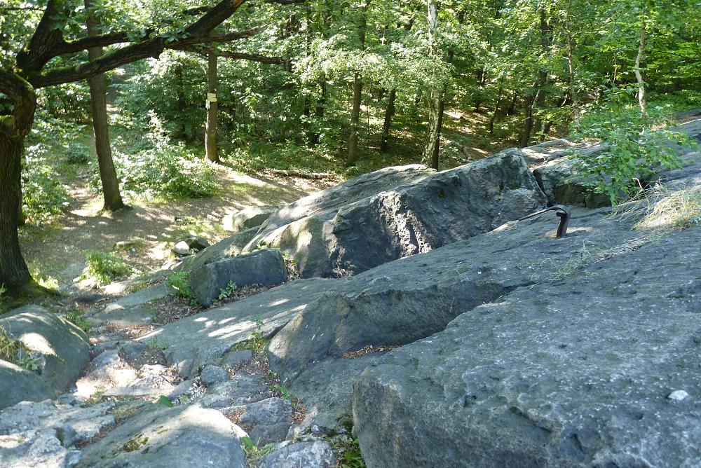 pohled z výšiny